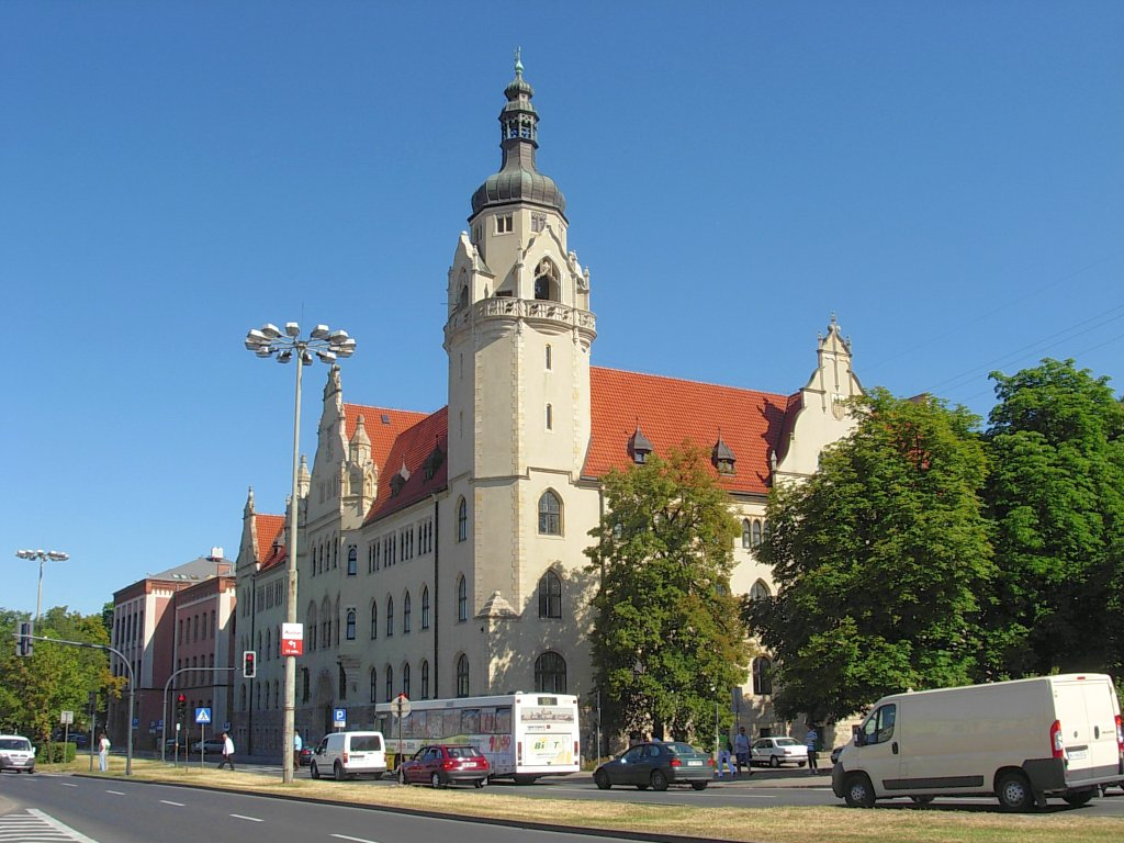 Sąd Okręgowy w Bydgoszczy